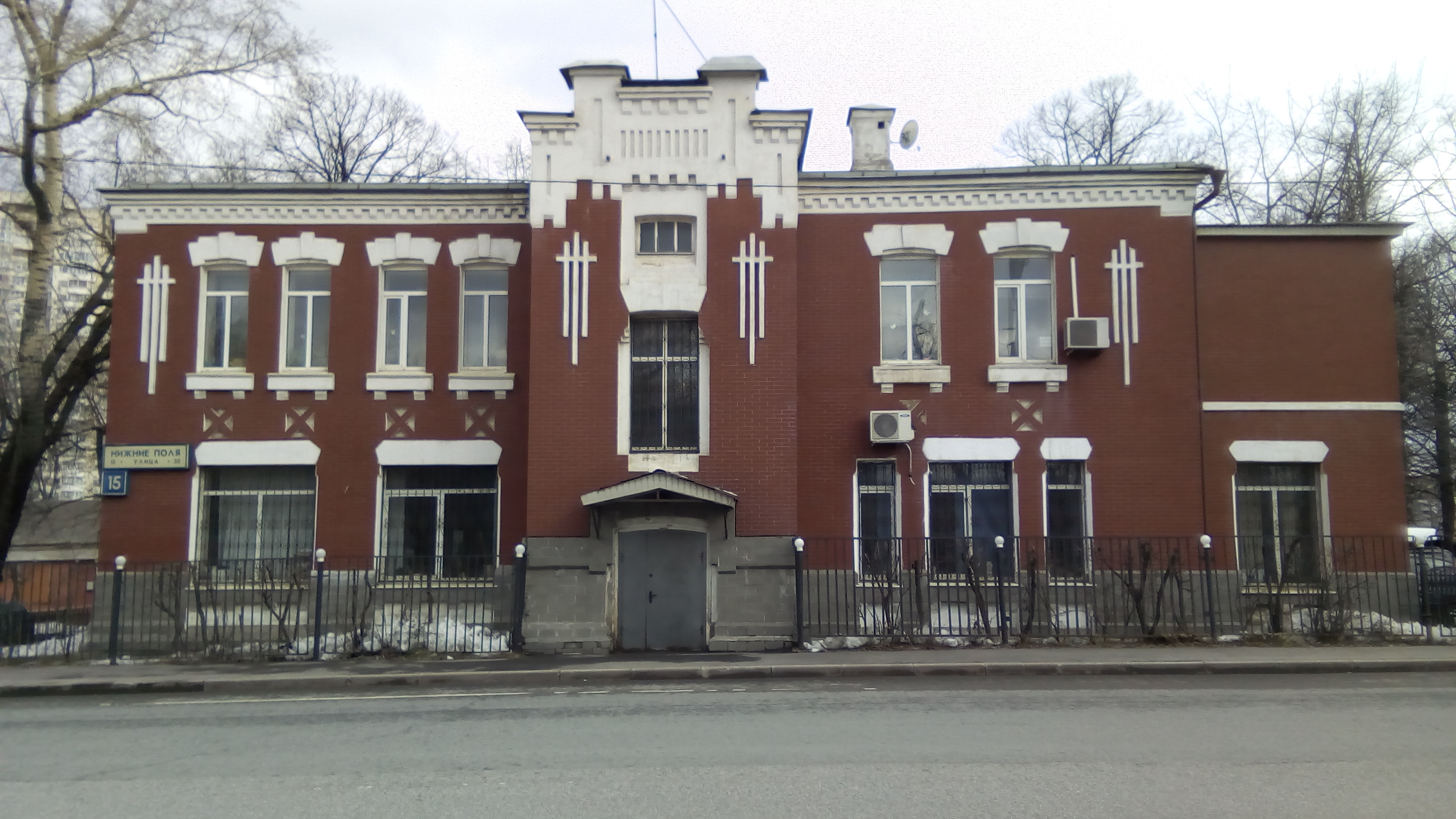 Интересное здание в Москве по адресу: Улица Нижние Поля, дом 15 - техническая контора и квартиры служащих бывшей Люблинской станции аэрации. Проект Макса Гепнера, 1901 года. Управление станции - маленький квартал из таких вот домиков - было построено к югу от бывшего Люблинского литейно-механического завода, и сразу к югу и востоку от этого квартала начинались те самые поля, куда сливали со всей Москвы.